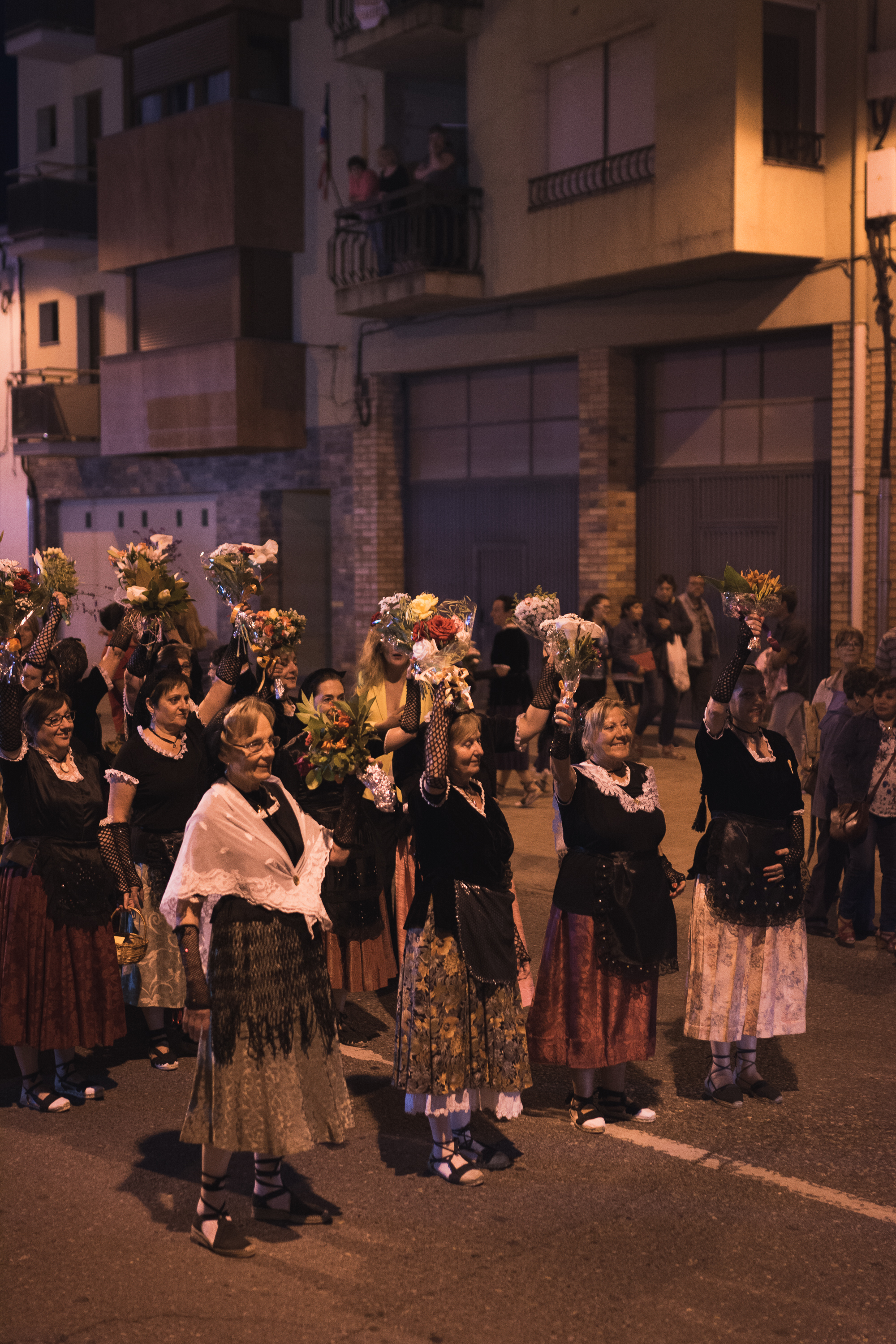 Desfilada de Pubilles l'any 2016 durant les Falles de la Pobla de Segur